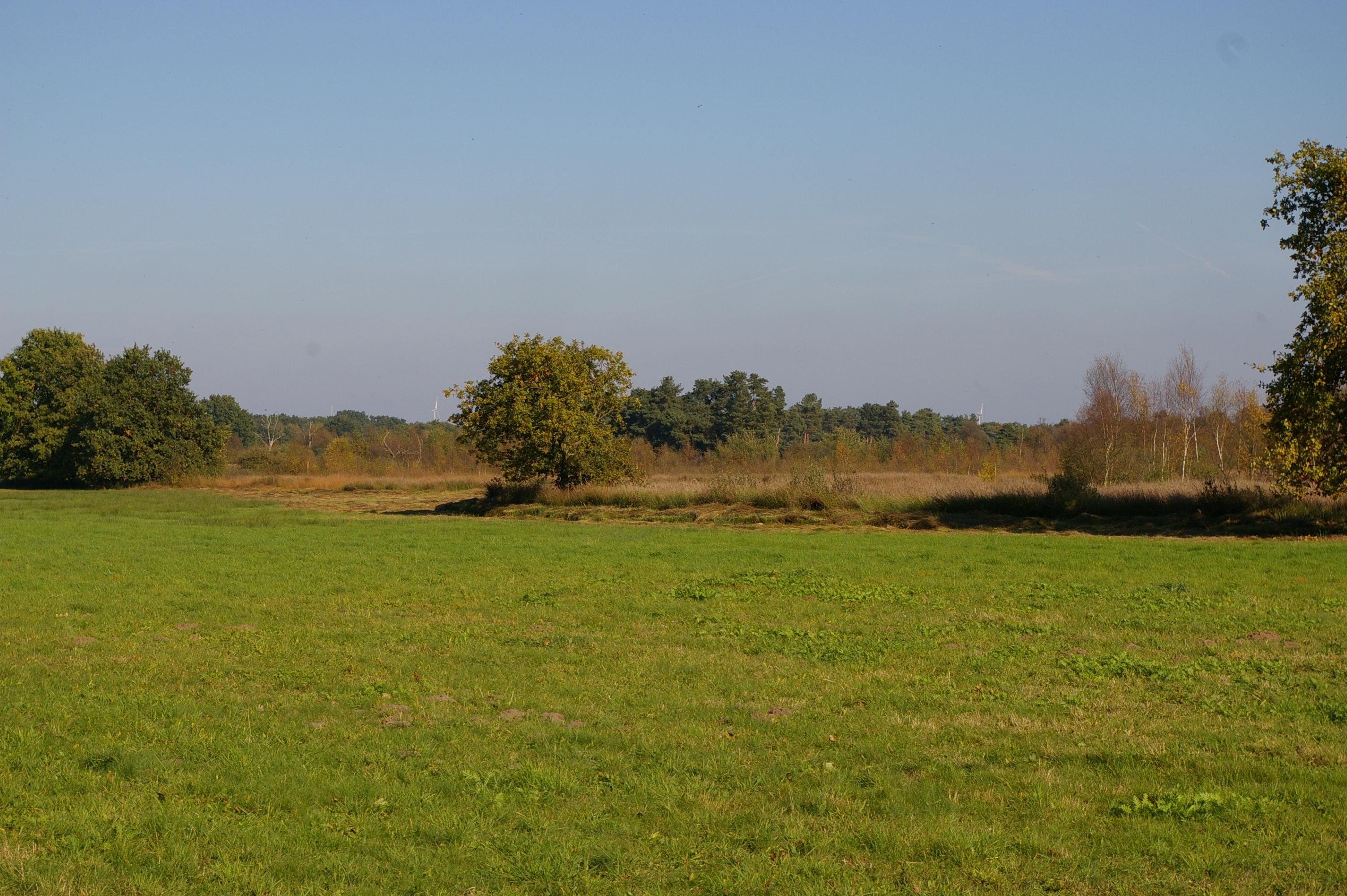 Das Große Renzeler Moor bei Renzel